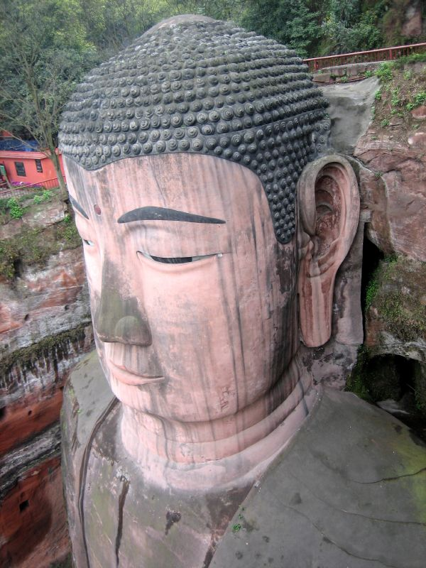 Head of Leshan Buddha.